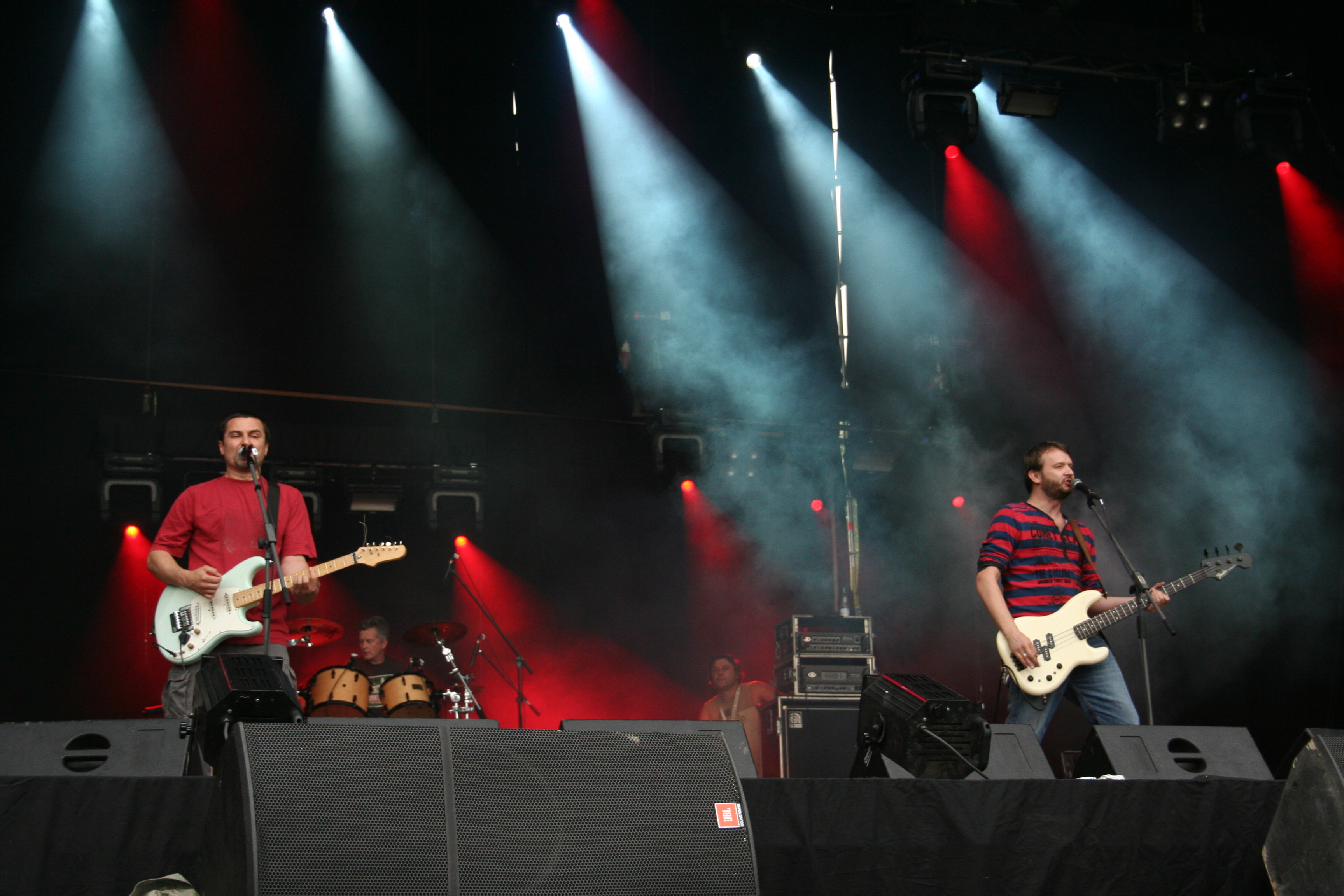 Dezerter, Off Festival, Mysłowice